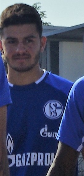 Rabbi Matondo